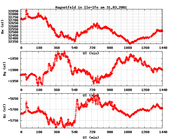 Das Magnetfeld am 31.3.2001 in Ile-Ife, Nigeria (nahe am magnetischen Äquator).Es sind starke Schwankungen durch einen magnetischen Sturm zu sehen.